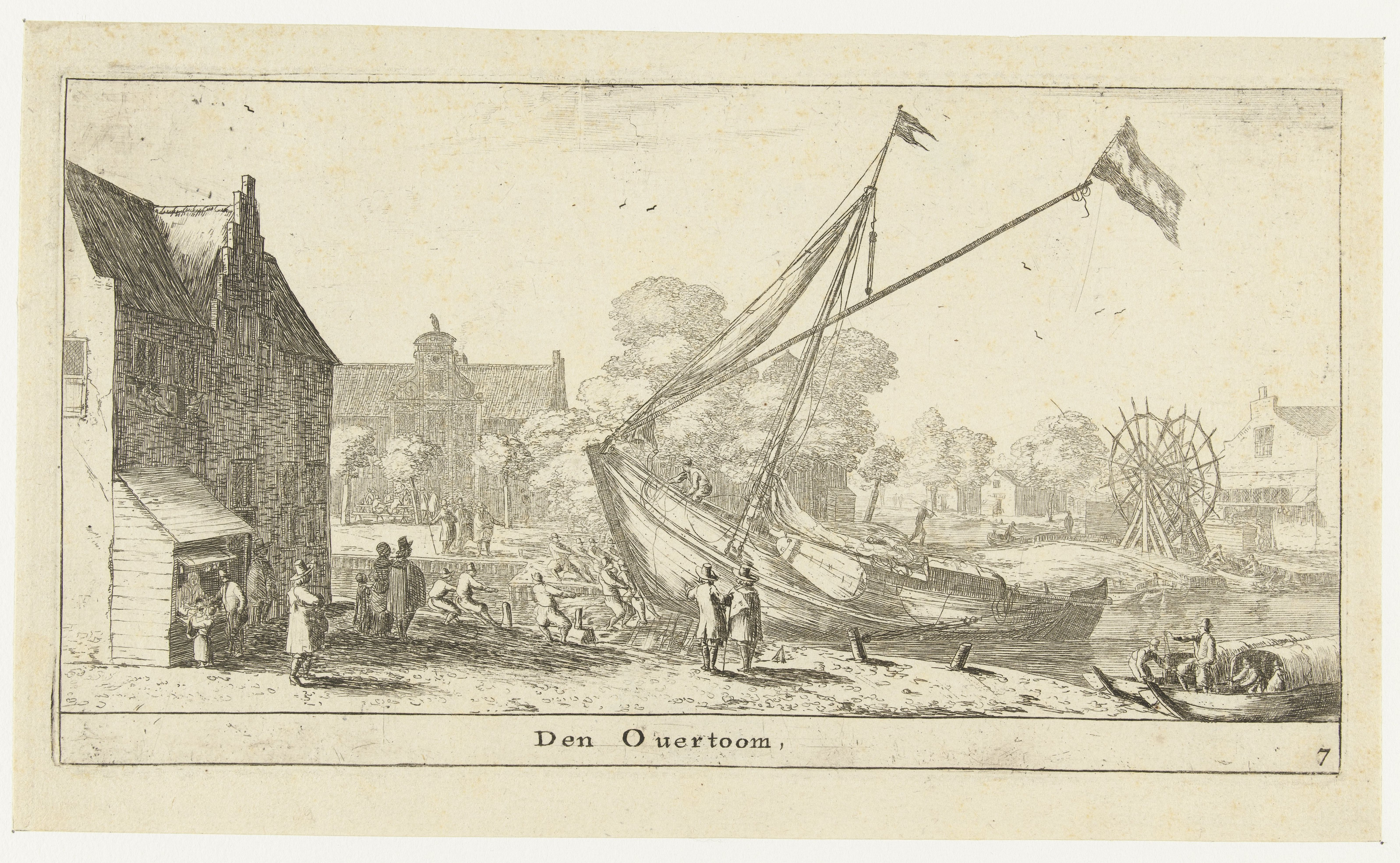 Een schip wordt over de overtoom getrokken, van de Kostverlorenvaart naar de Schinkel. Links vooraan het Leidse veerhuis, bij het begin van de Amstelveenseweg, daarachter de herberg De Valk aan de Sloterkade.